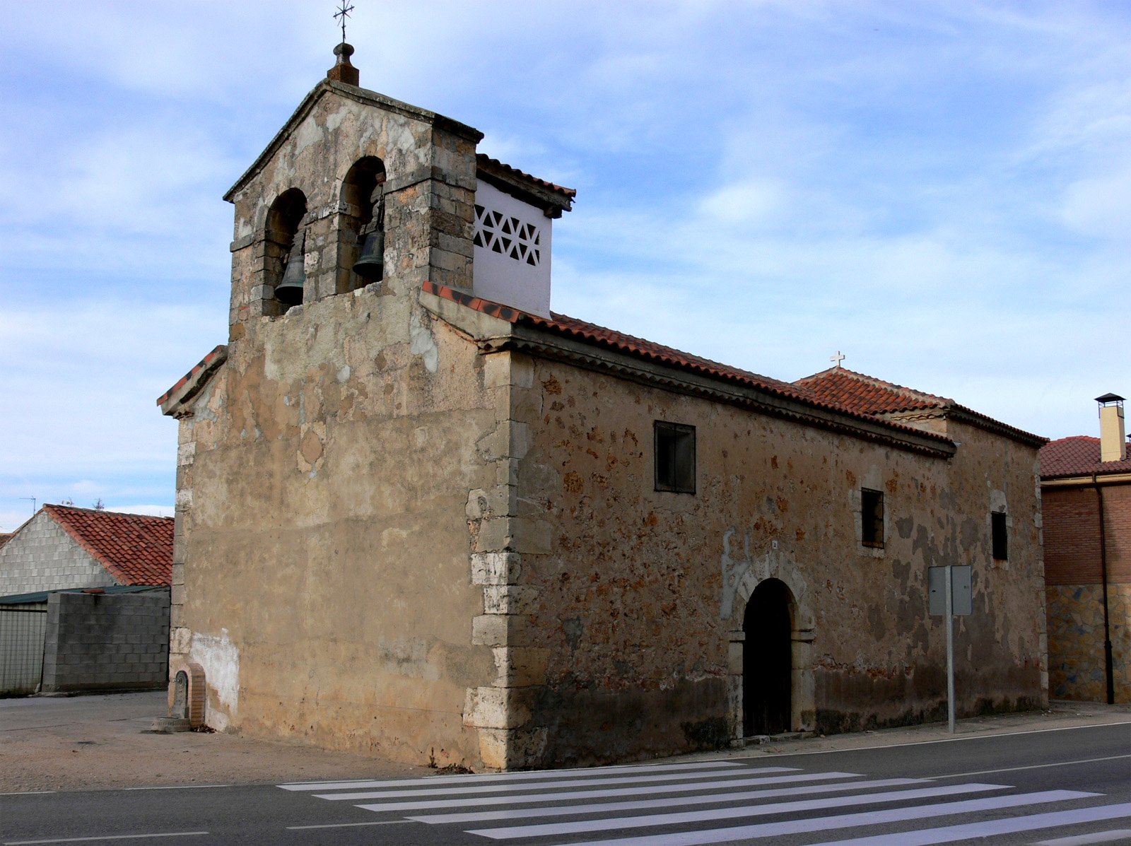 Iglesia de San Miguel en Valdealvillo (Soria - España).